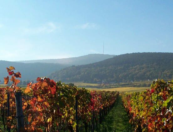 Gimmeldinger Weinberge im Herbst 2001, im Hintergrund der Sendemast des Weinbiet, selbst fotografiert und freigegeben